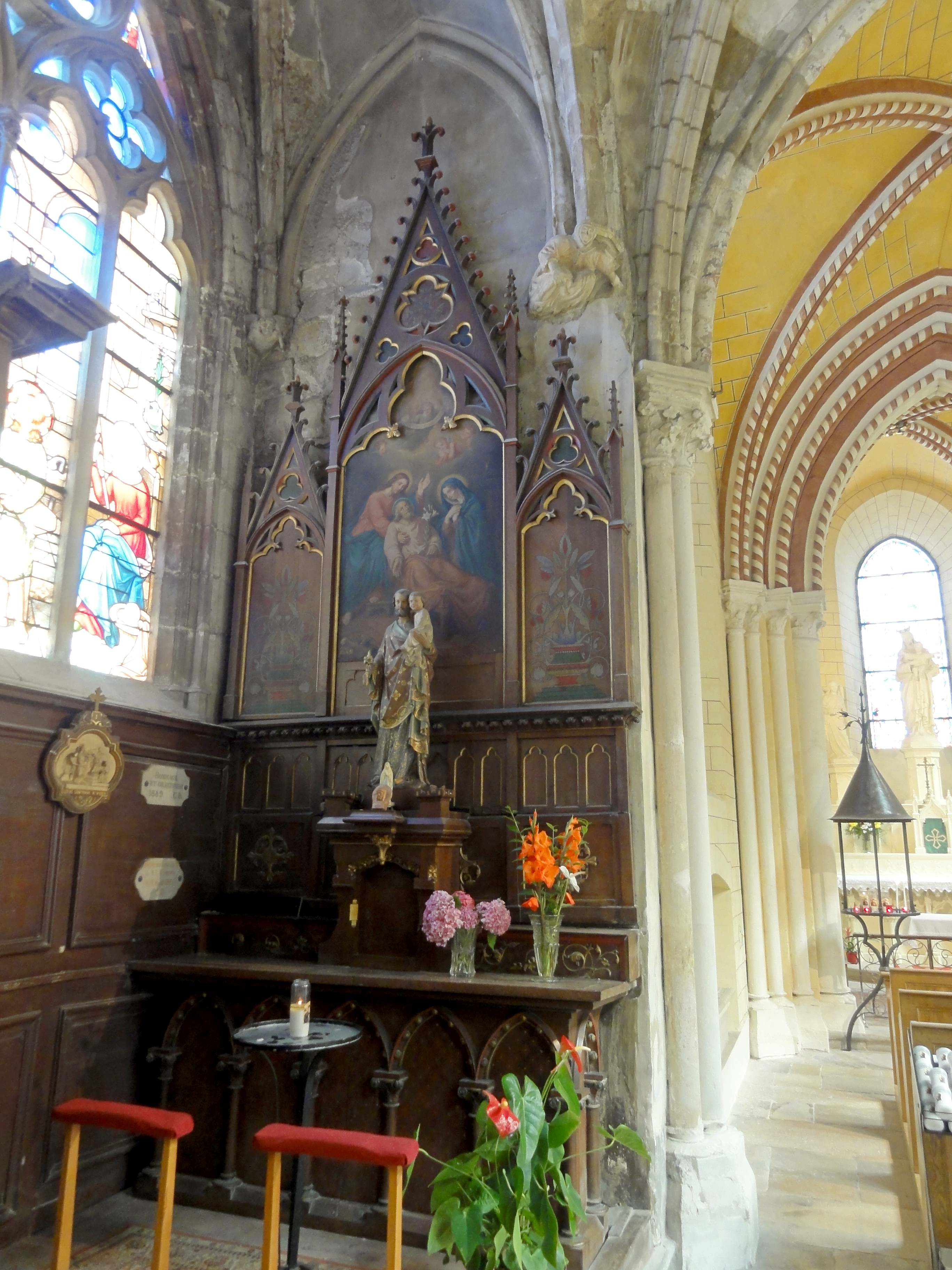 Voir titre.